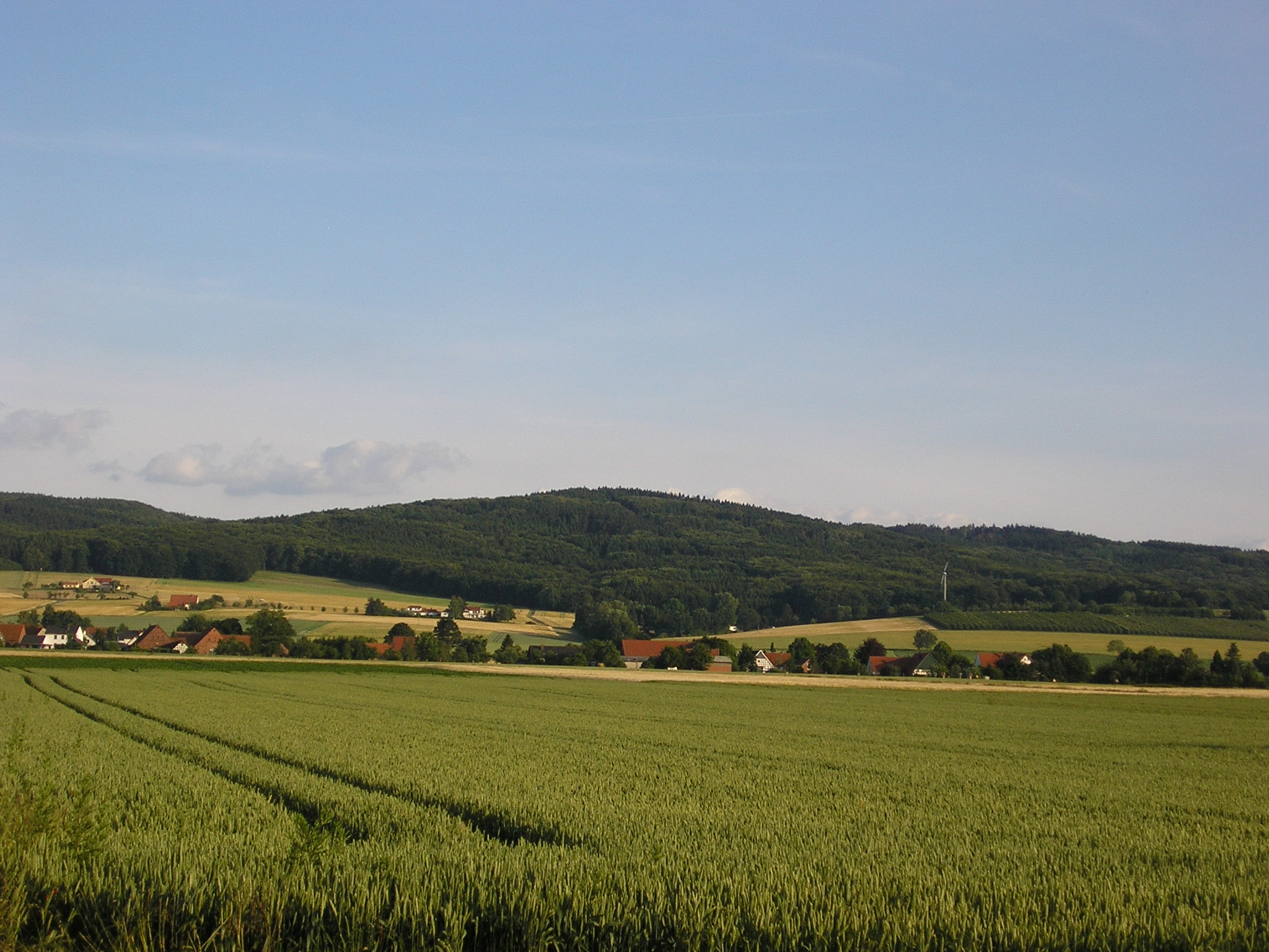 Wiehengebrige bei Holzhausen